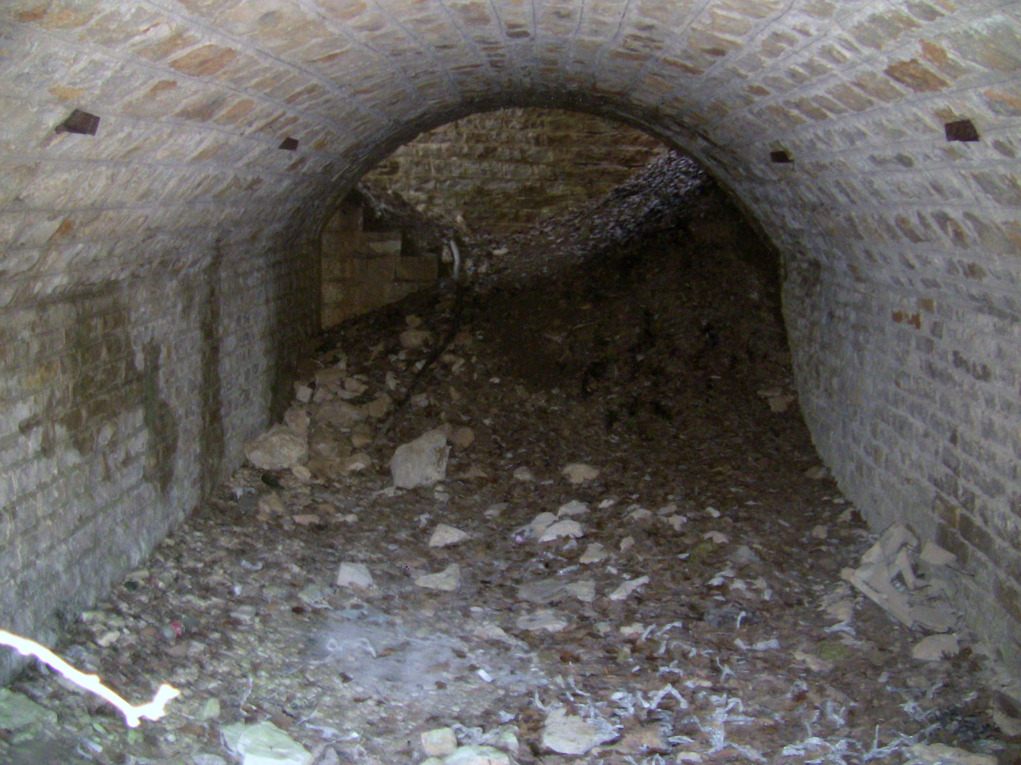 La chambre d'une traverse-abris de la batterie annexe du front sud-ouest du fort de Planoise, à Besançon (Doubs, France).